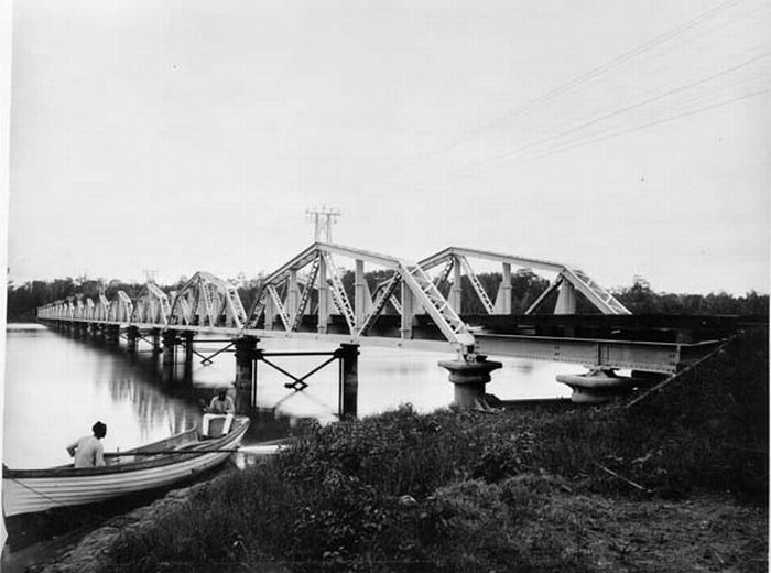 Foto. IJzeren spoorbrug van de Deli Spoorweg Maatschappij met twintig overspanningen over de Deli rivier in de spoorlijn van Medan naar Belawan.